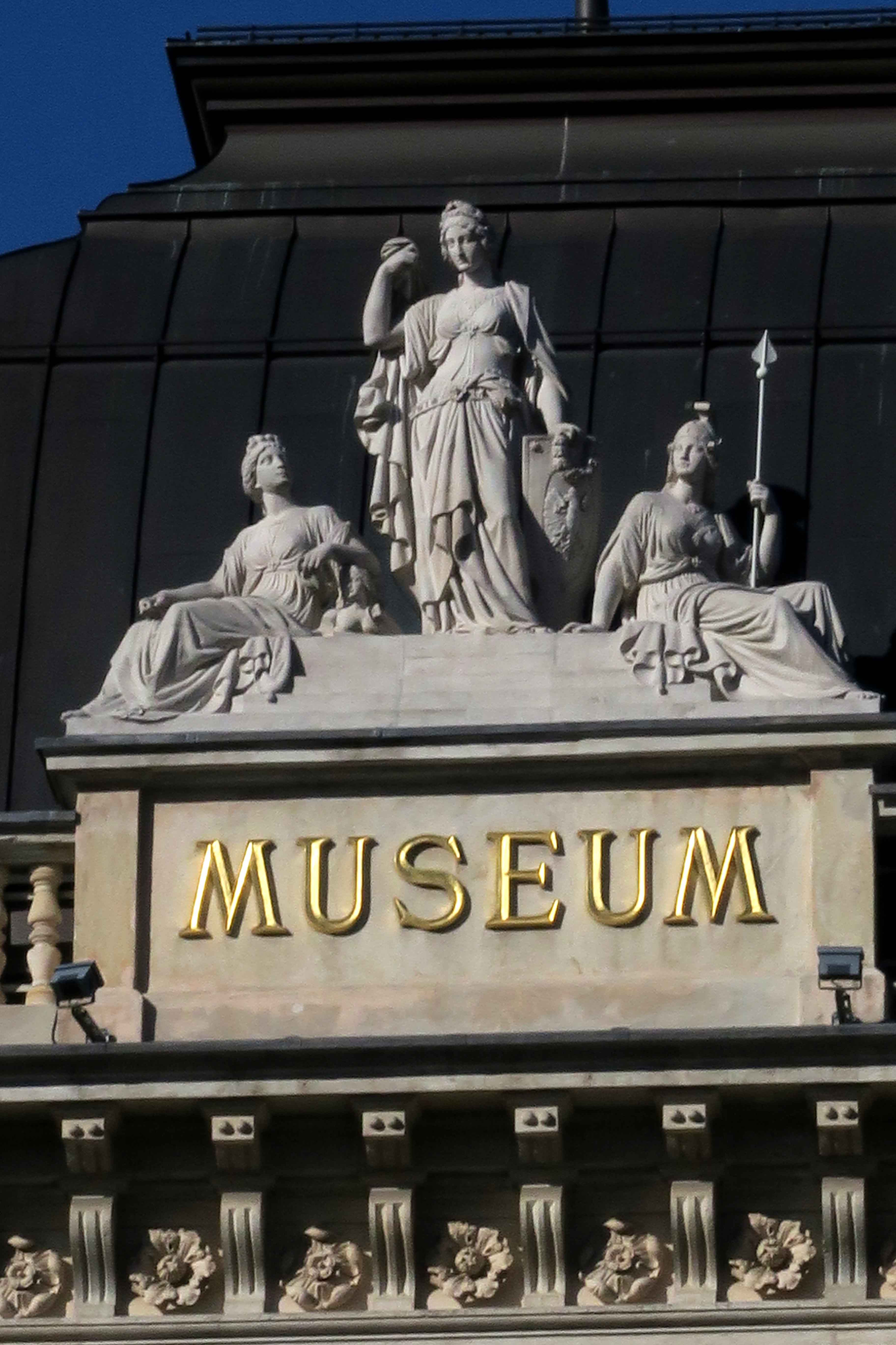 Museum mit Figurengruppe